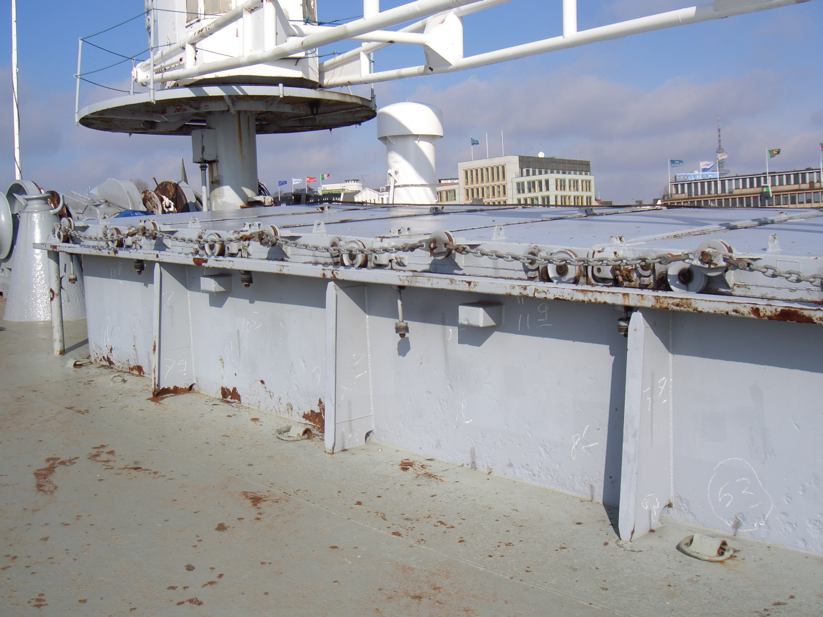 Lukendeckel